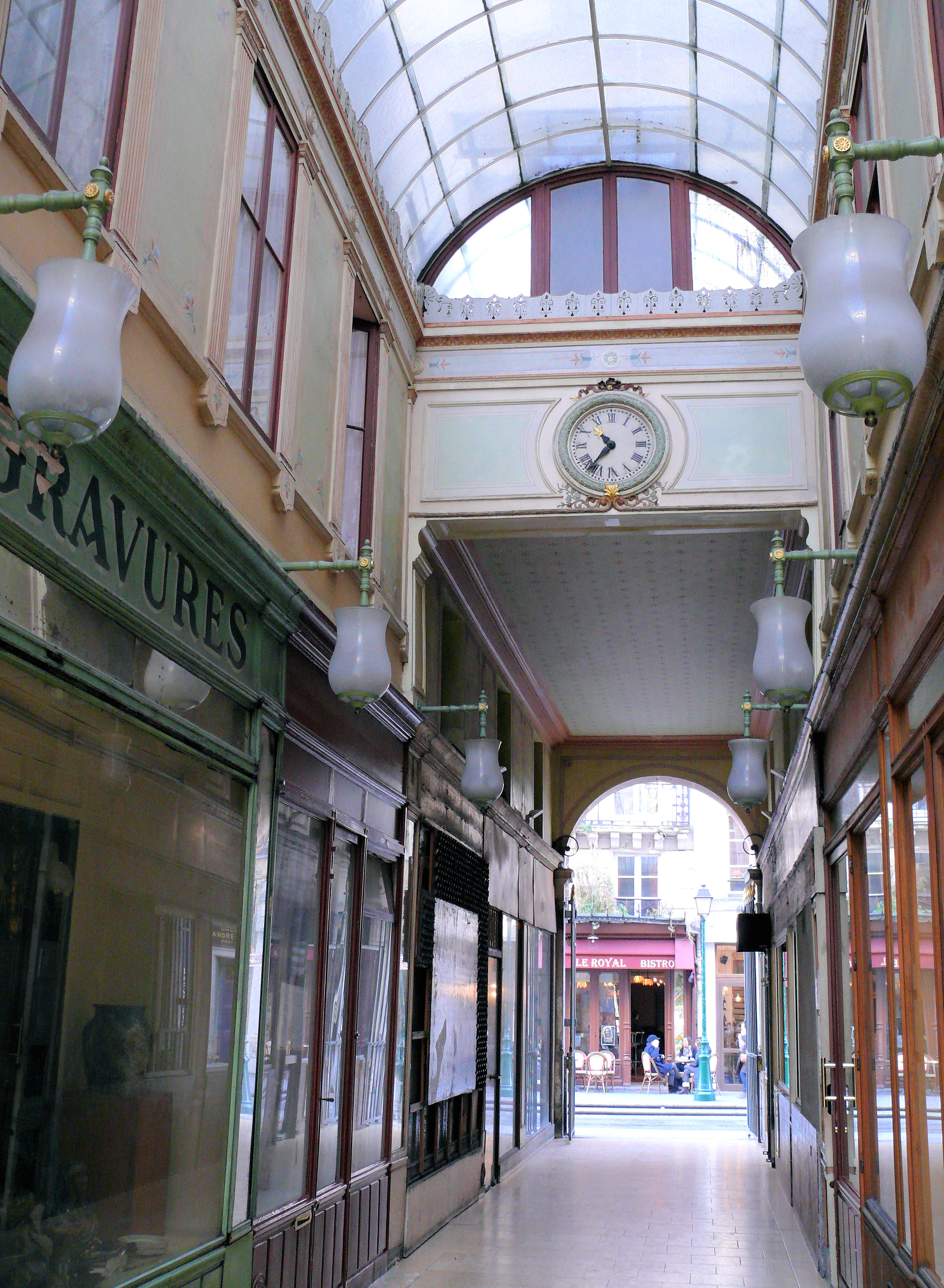 Paris 2e arrondissement - Passage du Bourg-l'Abbé